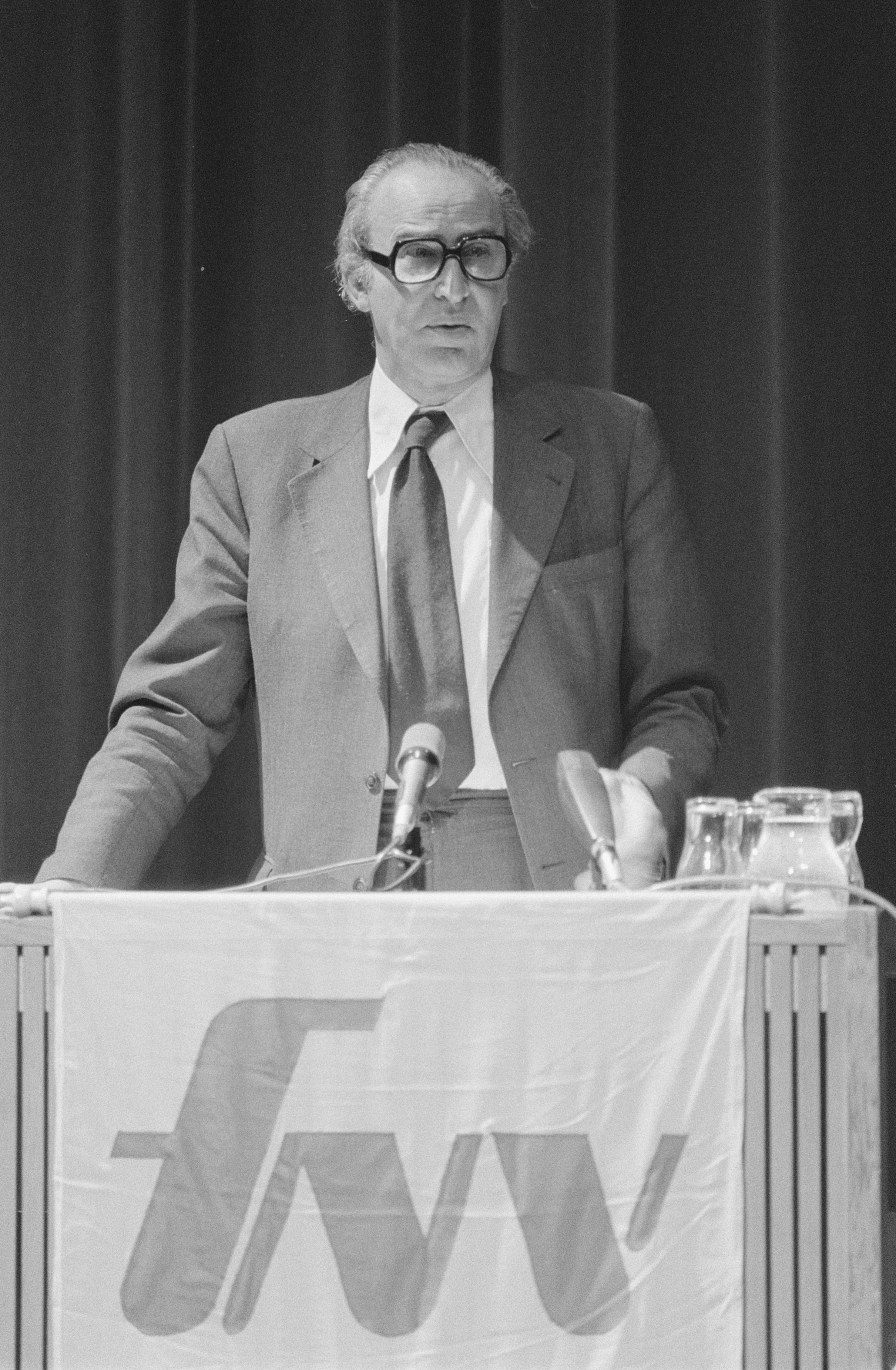 Collectie / Archief : Fotocollectie Anefo Reportage / Serie : [ onbekend ] Beschrijving : FNV over EEG in Amsterdam; oud-minister Vredeling aan het woord Datum : 6 april 1977 Locatie : Amsterdam, Noord-Holland Trefwoorden : toespraken, vakbonden Persoonsnaam : Vredeling, Henk Instellingsnaam : EEG Fotograaf : Peters, Hans / Anefo Auteursrechthebbende : Nationaal Archief Materiaalsoort : Negatief (zwart/wit) Nummer archiefinventaris : bekijk toegang 2.24.01.05 Bestanddeelnummer : 934-6621